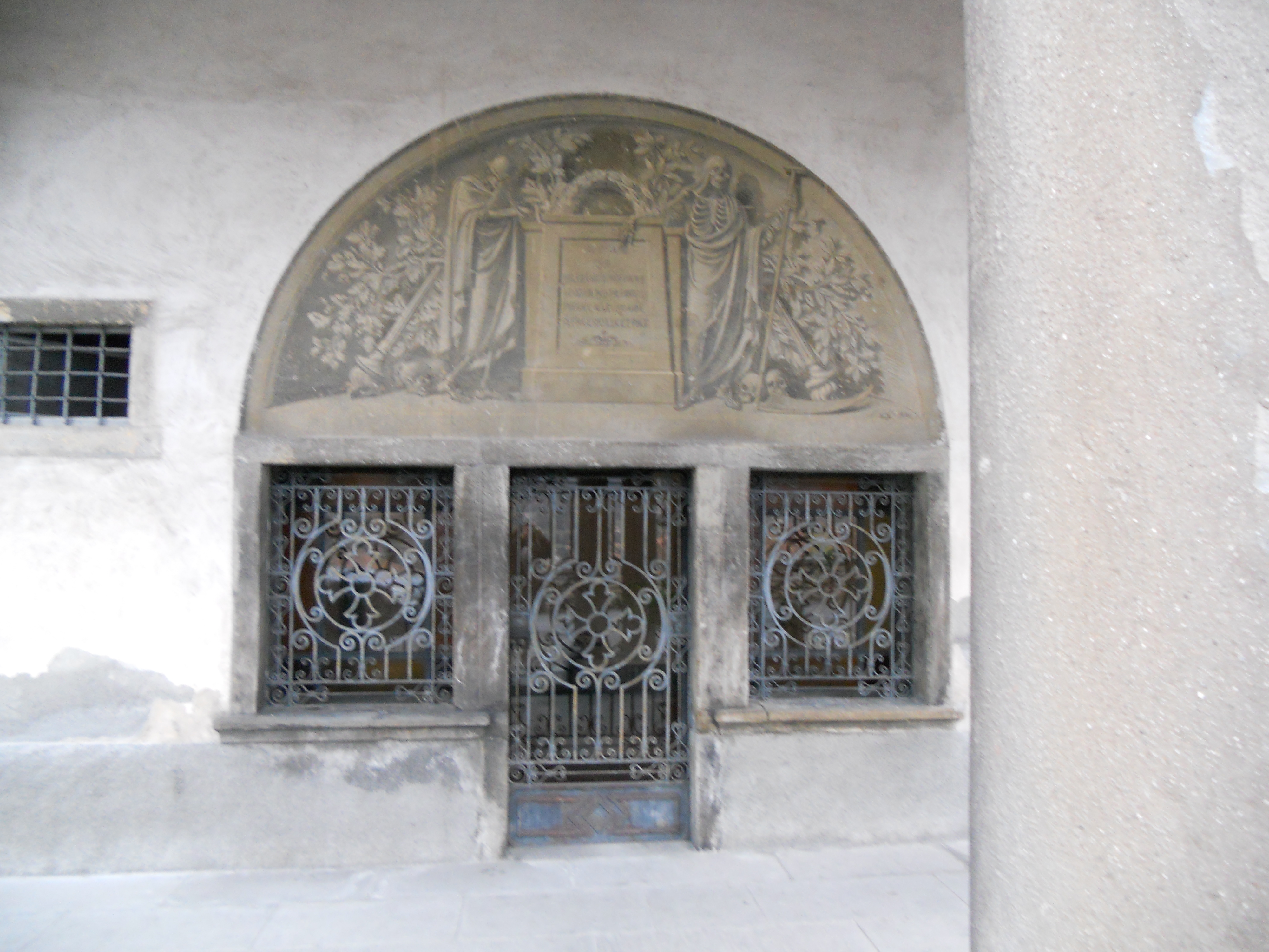 Cappella dedicata alla peste del 1630 annessa alla chiesa di San Lorenzo in Bergamo